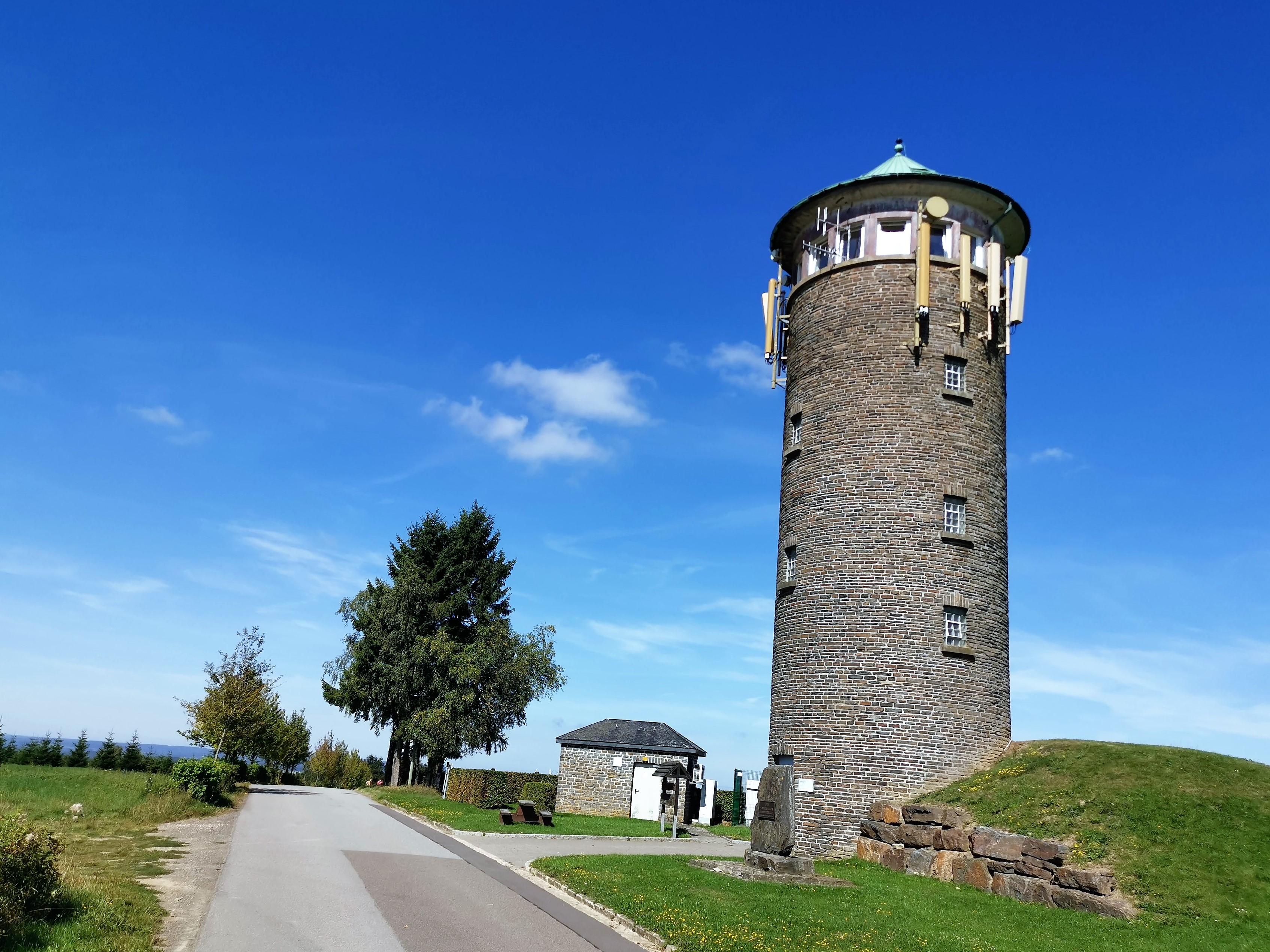 Huldange, château d'eau au lieu-dit "Buergplaz".